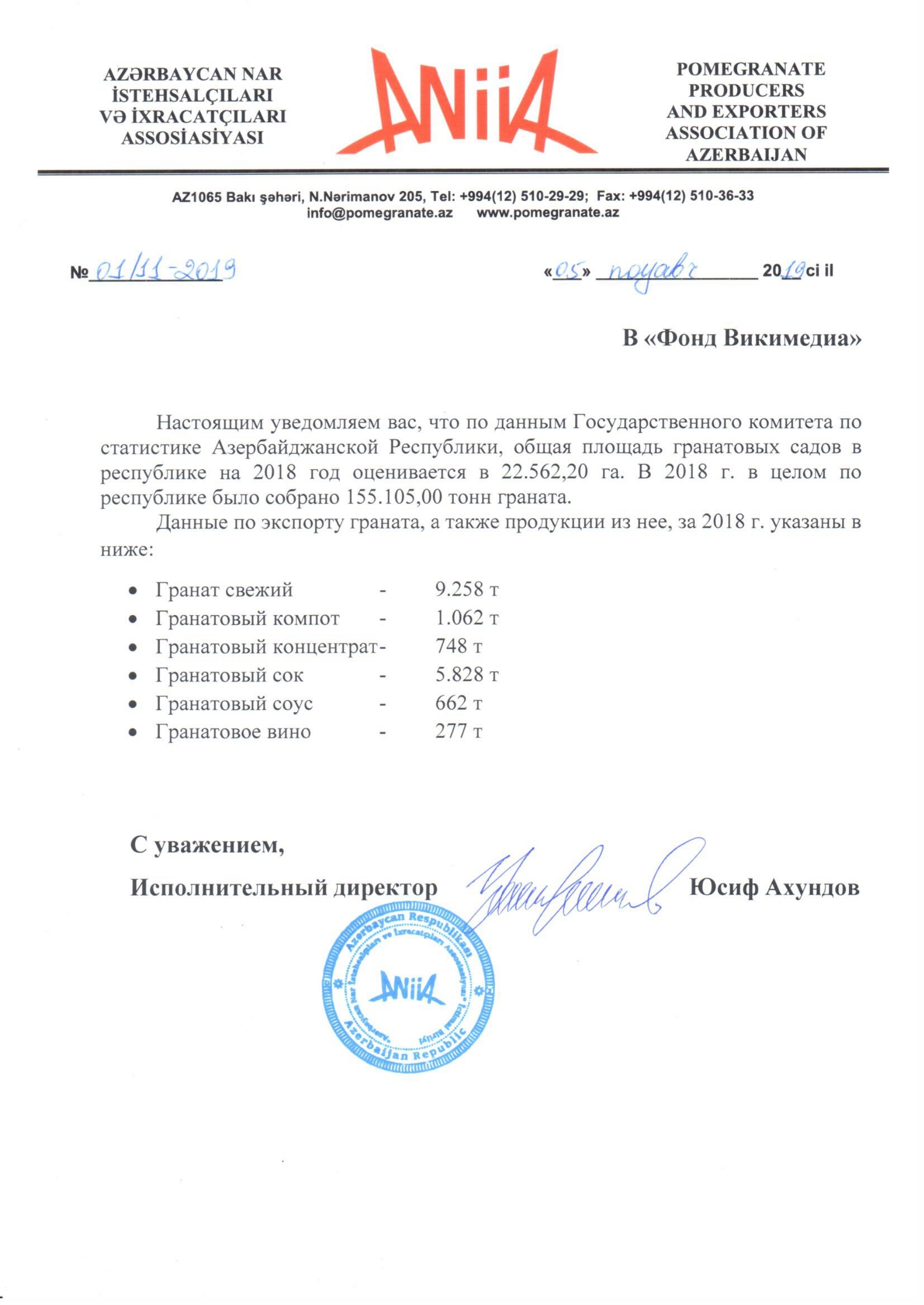 Azərbaycan Nar İstehsalçıları və İxracatçıları Assosiasiyasından Ruvikiyə göndərilən məktub.